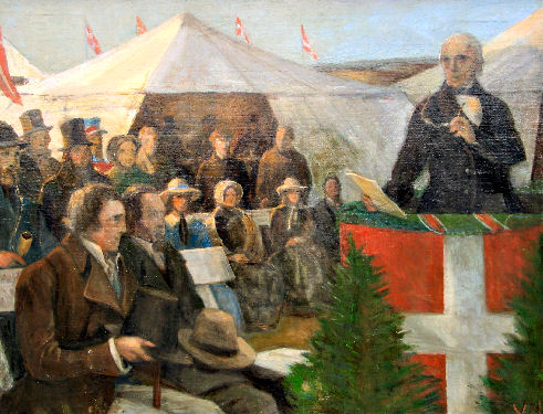 Blicher på Himmelbjerget. Blichermuseet på Herningsholm, Herning Museum.